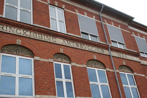 Holstebro Amssygehus